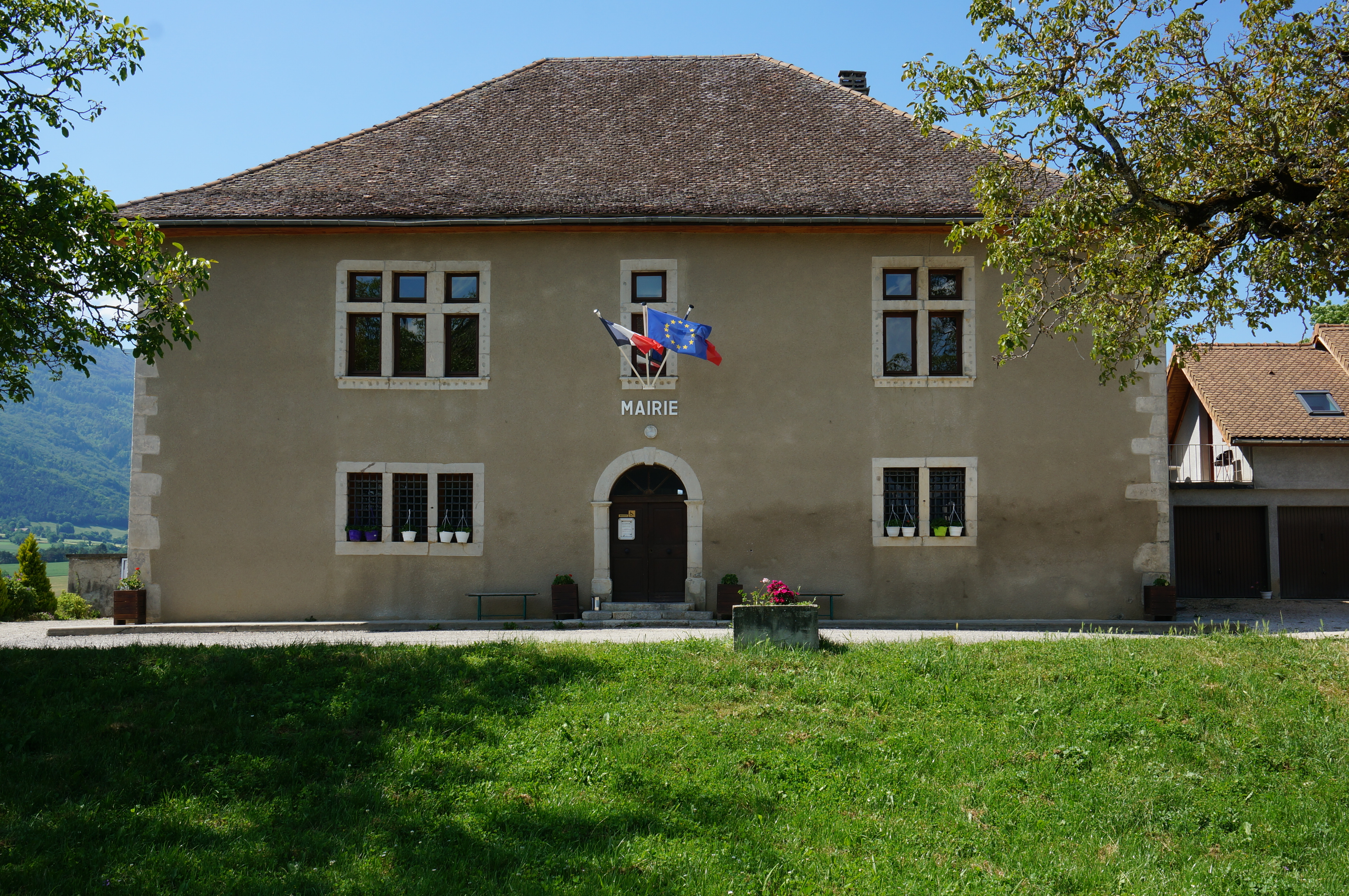 Maire de Roissard, Isére